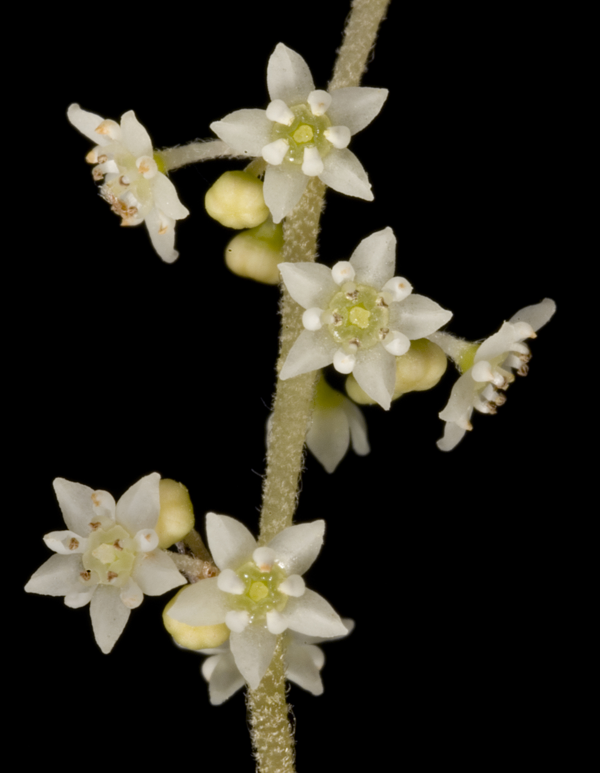 KRT3251